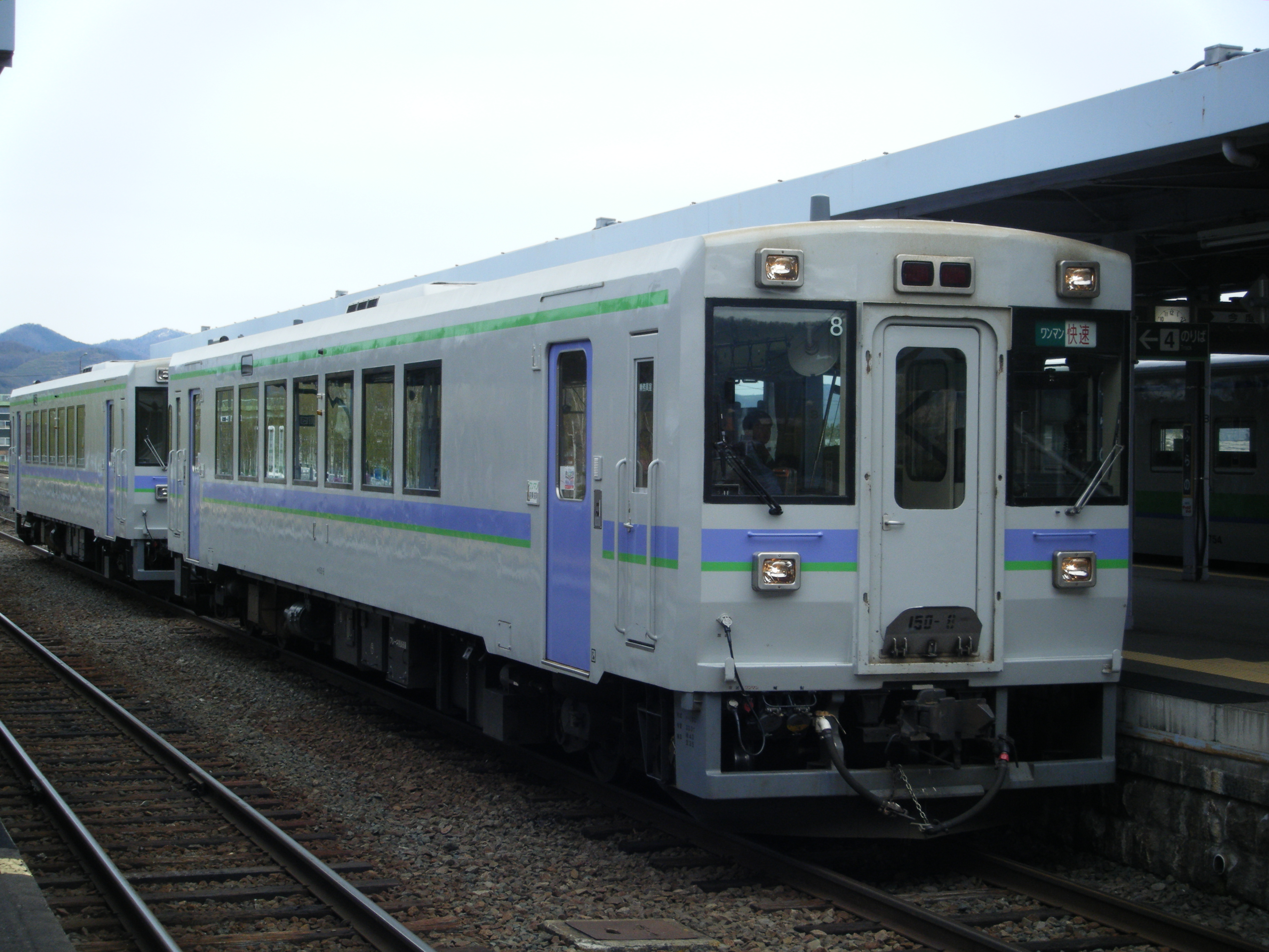 JR北海道キハ150形気動車（根室本線 富良野駅にて撮影）